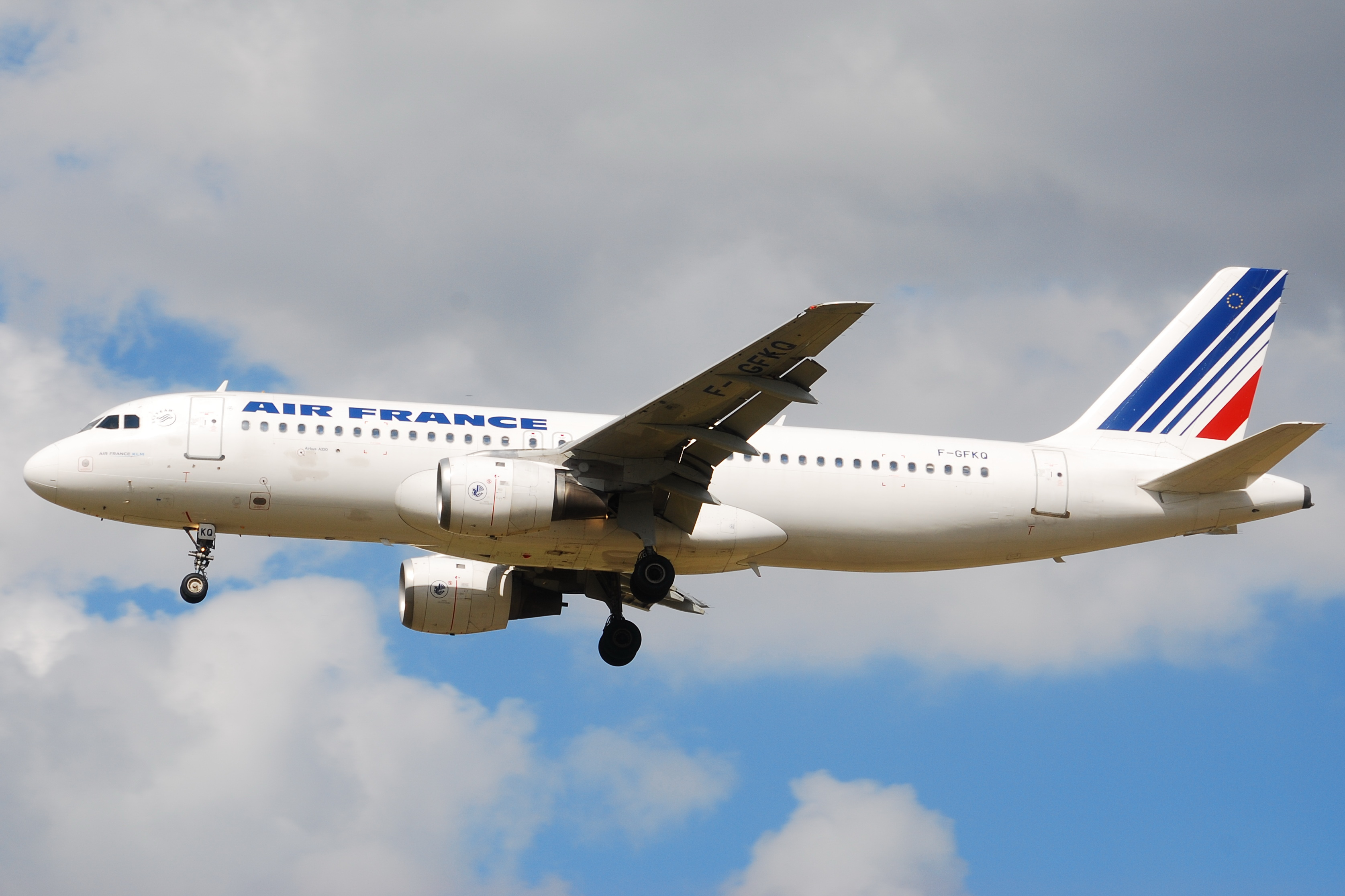 Photo prise à l'aéroport de Toulouse-Blagnac (LFBO) en France. Picture take at Toulouse-Blagnac Airport (LFBO) in France.